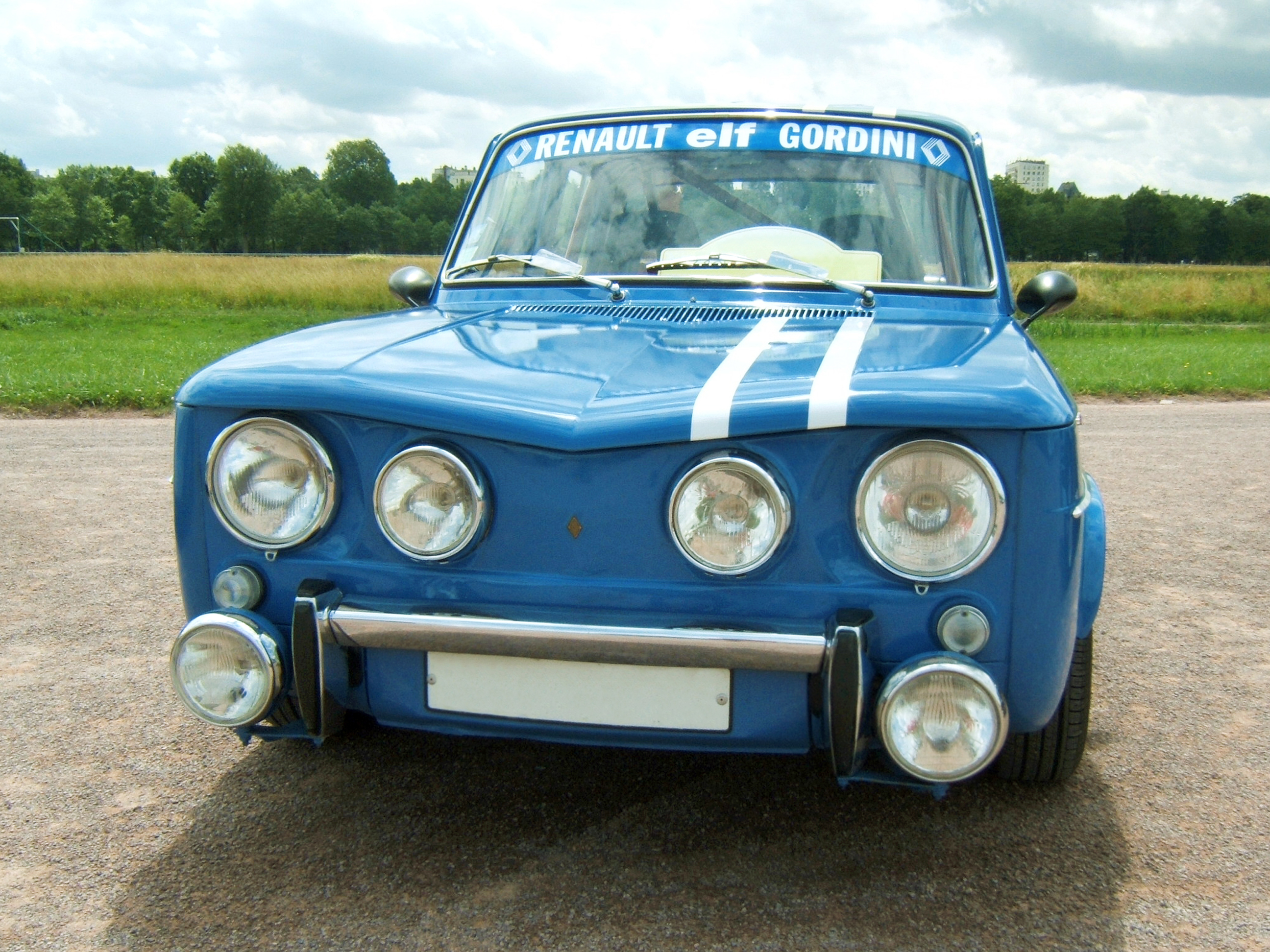 Renault 8 Gordini, face avant.